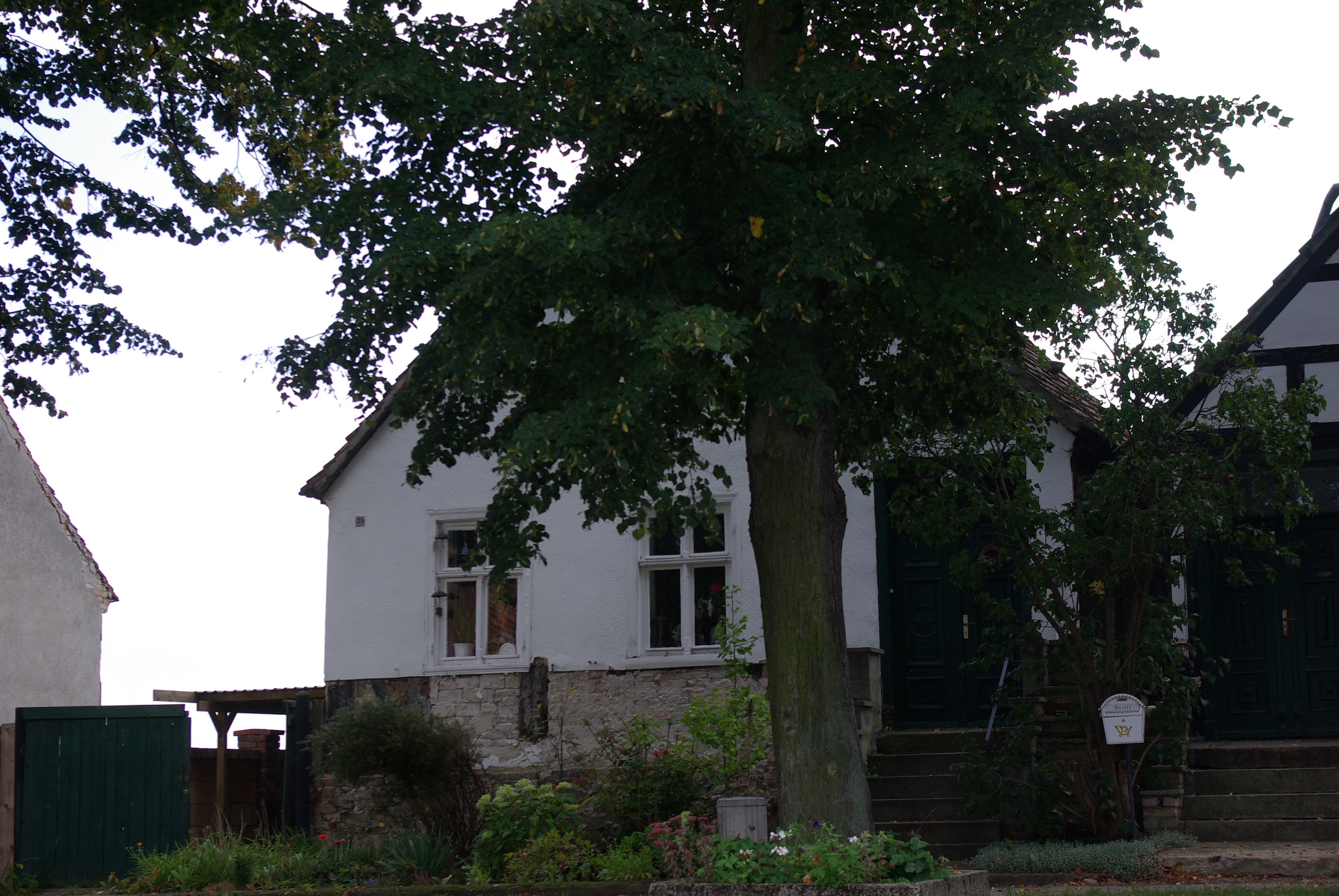 Wriezen in Brandenburg. Das Haus Eichwerder 31 im Ortsteil Eichwerder steht unter Denkmalschutz.